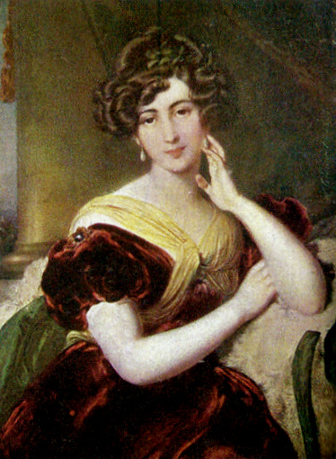 Izabela Sanguszkowa